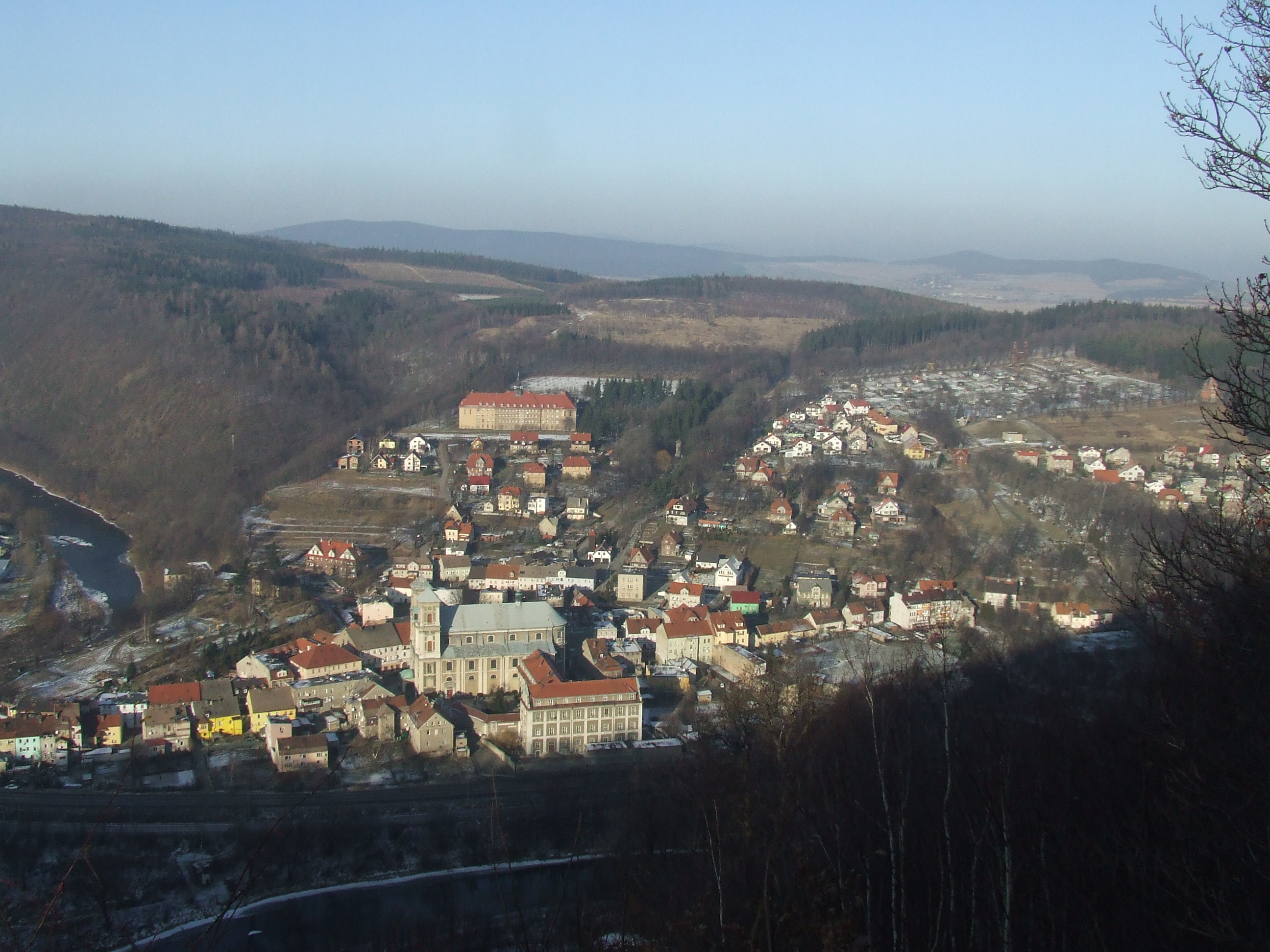 Panorama części północnej miasta Bardo.